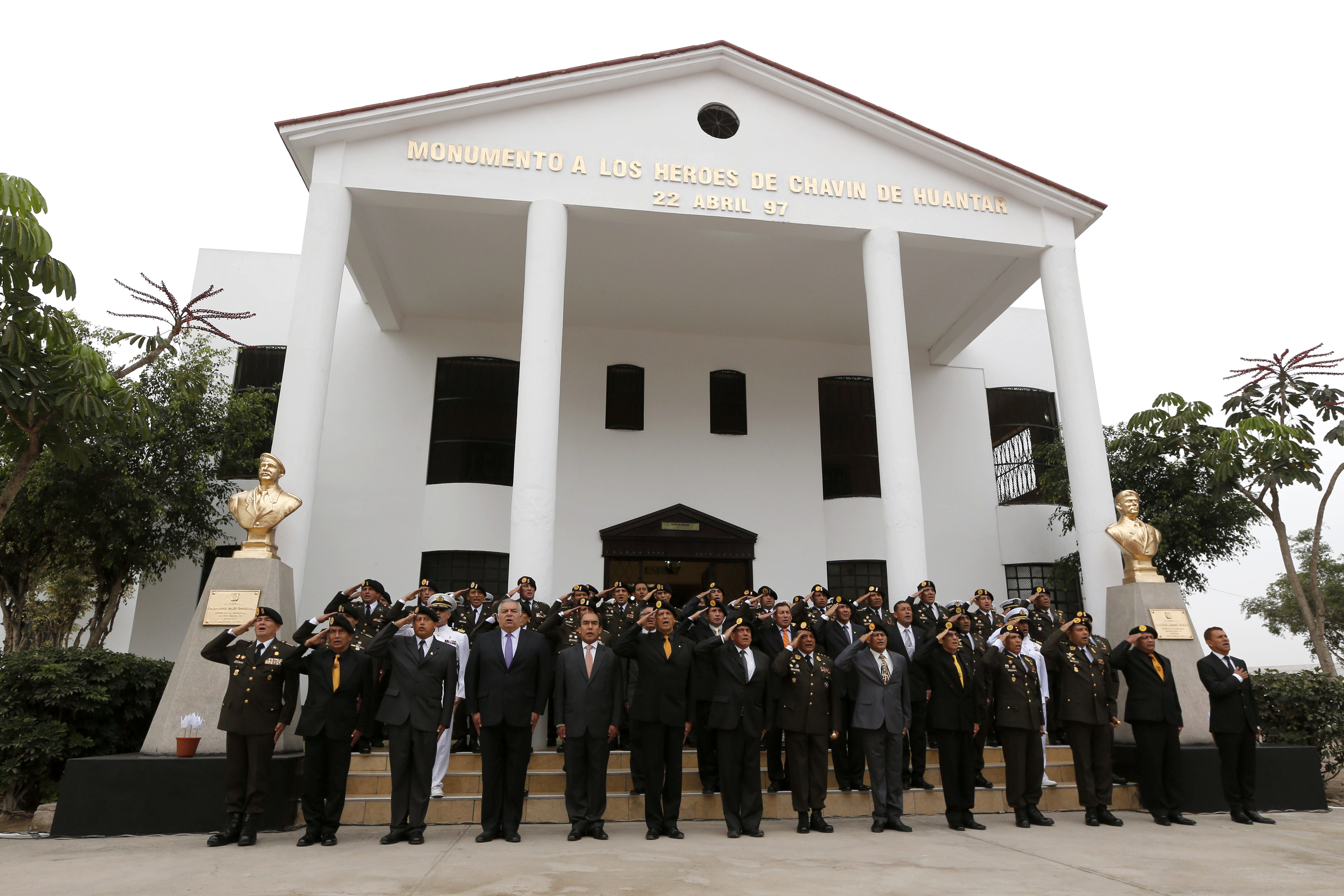 El ministro de Defensa, Jakke Valakivi presidió la ceremonia por el décimo noveno aniversario de la operación “Chavín de Huántar”, donde se rindió homenaje a los valerosos comandos que rescataron a 72 rehenes cautivos por la agrupación terrorista MRTA, en abril de 1997. Al evento asistieron el jefe del Comando Conjunto de las Fuerzas Armadas, Almirante Jorge Moscoso y el Comandante General del Ejército, General Luis Ramos Hume, y representantes de los Comandantes Generales de la Marina de Guerra y la Fuerza Aérea, además de los comandos que participaron en dicho rescate. La ceremonia empezó con un acto litúrgico que estuvo a cargo del obispo castrense, monseñor Juan Carlos Vera Plasencia, quien durante la homilía tuvo palabras de agradecimiento y gratitud a los militares que participaron en la acción, elevando asimismo sus oraciones por los caídos, Coronel EP Juan Valer Sandoval y Mayor EP Raúl Jiménez Chávez, así como el magistrado Ernesto Giusti La Rosa quien fue el único rehén civil que perdió la vida. El general César Astudilo, actual Inspector General del Ejército y participante de dicha acción militar consideró que la ceremonia que se repite cada año, no solo es protocolar sino una acción que es digna de recordar porque gracias a ella se dijo “alto a la barbarie terrorista”, indicando además que esta historia no debe volver a repetirse por ser una ofensa a la libertad. El evento se realizó en las instalaciones de la 1ra Brigada de Fuerzas Especiales del Ejército, en Chorrillos, donde existe una réplica de la residencia de la Embajada del Japón donde ocurrieron los hechos. La Operación “Chavín de Huántar” es considerada una de las más exitosas acciones de rescate en el mundo. Participaron 140 valerosos comandos de las Fuerzas Armadas, y pusieron fin a 126 días de cautiverio de los rehenes. Oficina de Prensa Ministerio de Defensa 209 8530 anexo 4152